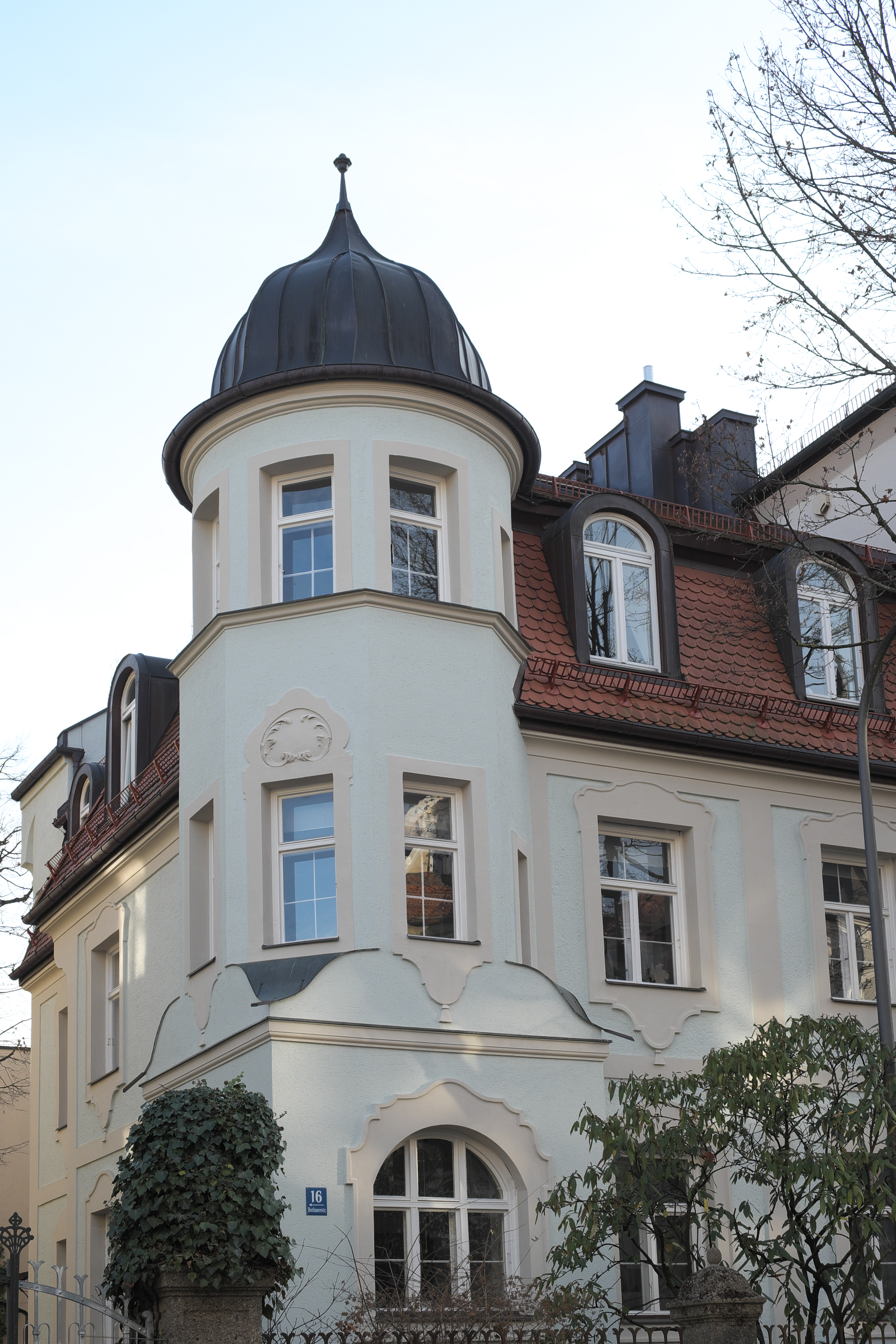 Villa in der Bothmerstraße 16 in Neuhausen im Stadtbezirk Neuhausen-Nymphenburg in München (Bayern/Deutschland)